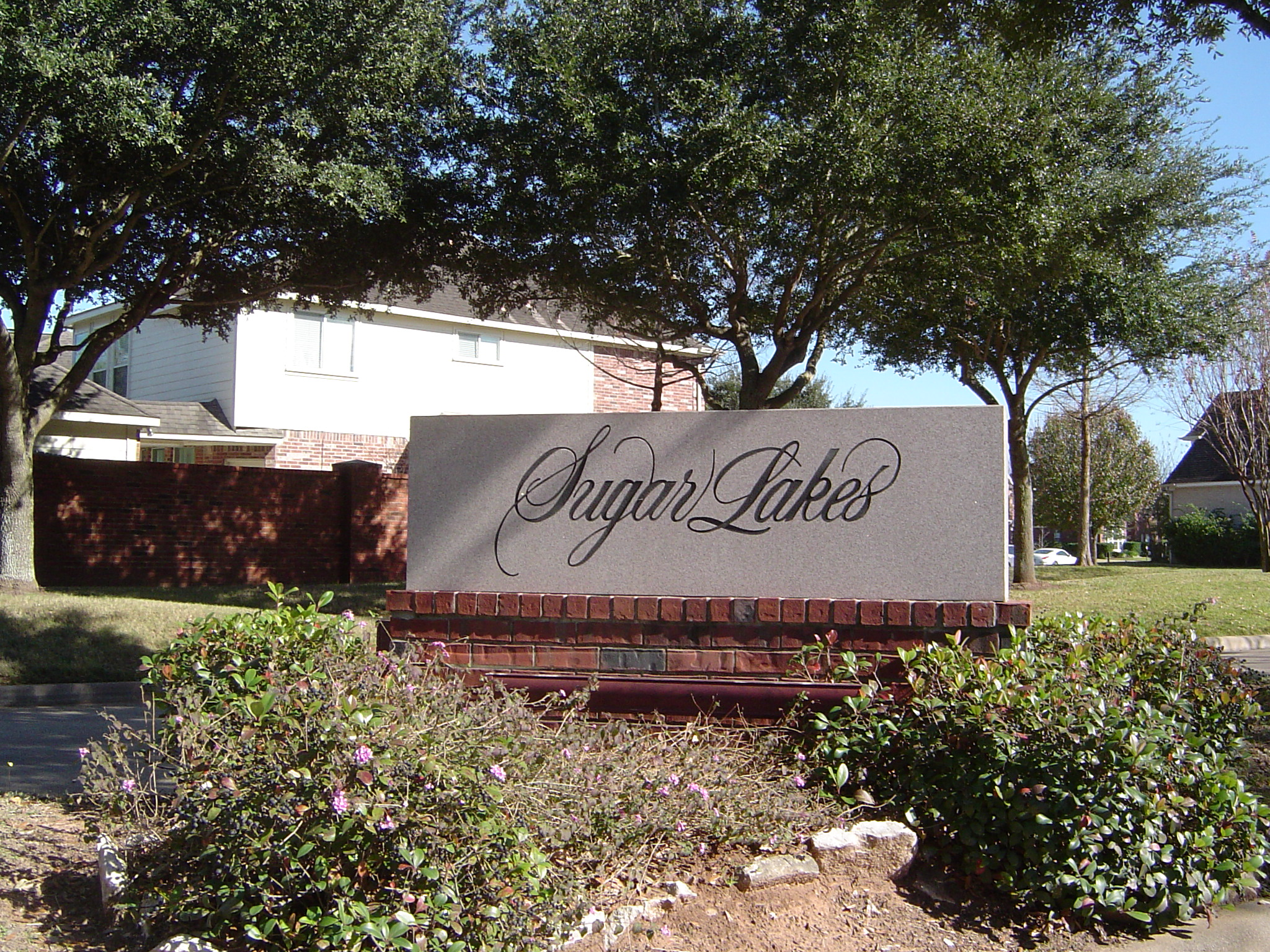 Sugar Lakes sign